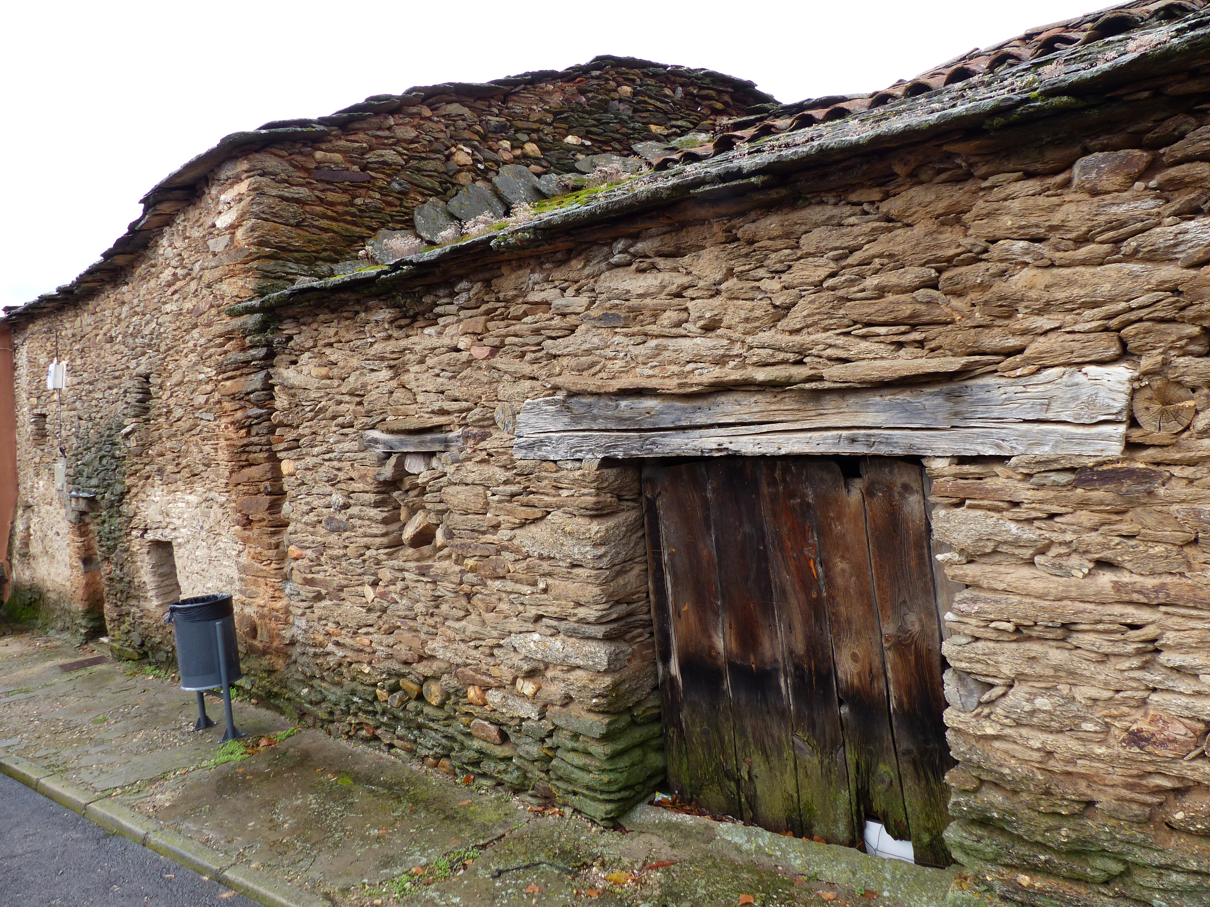 Zarzuela de Jadraque